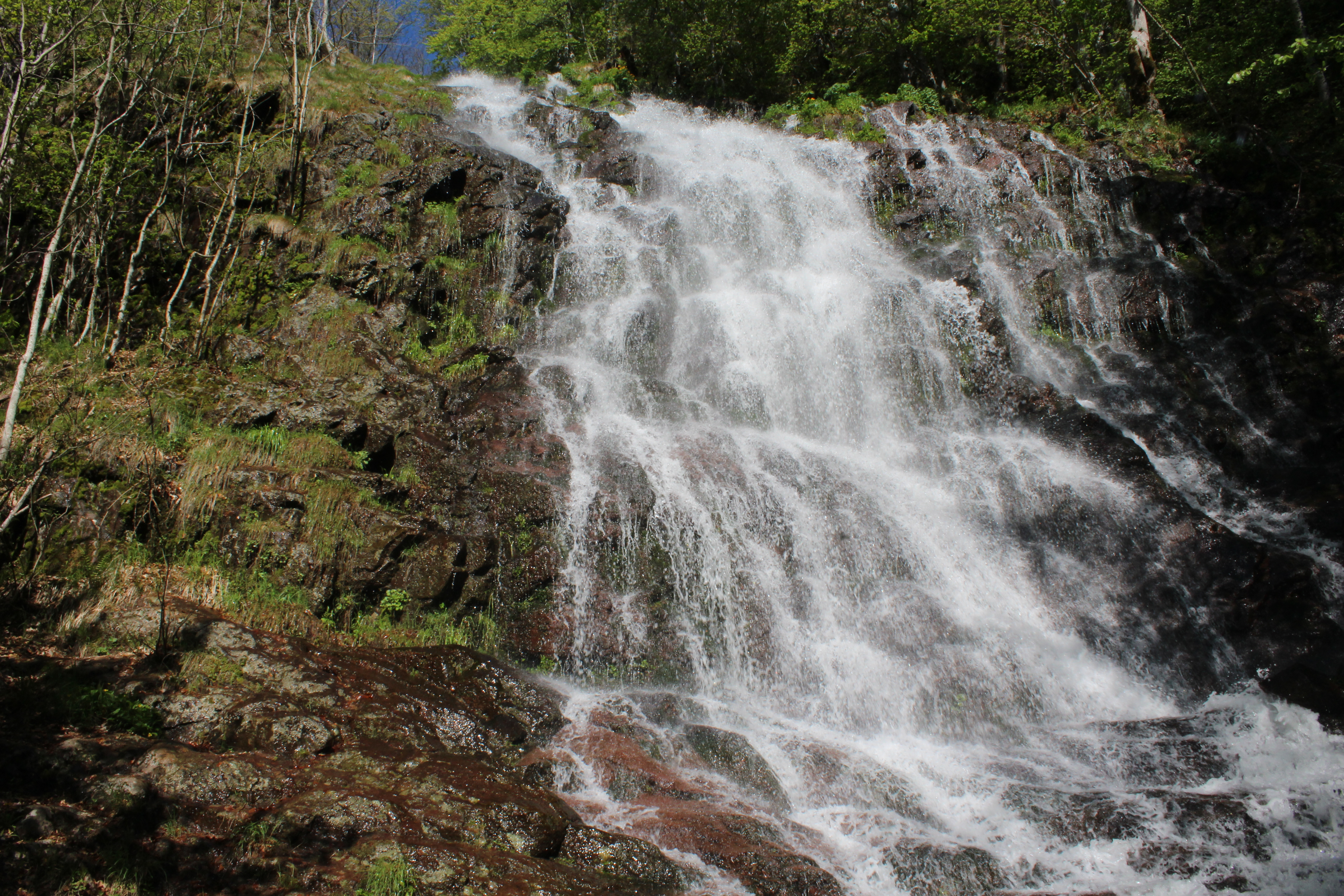 Srpski (latinica): Piljski vodopad na Piljskom potoku.